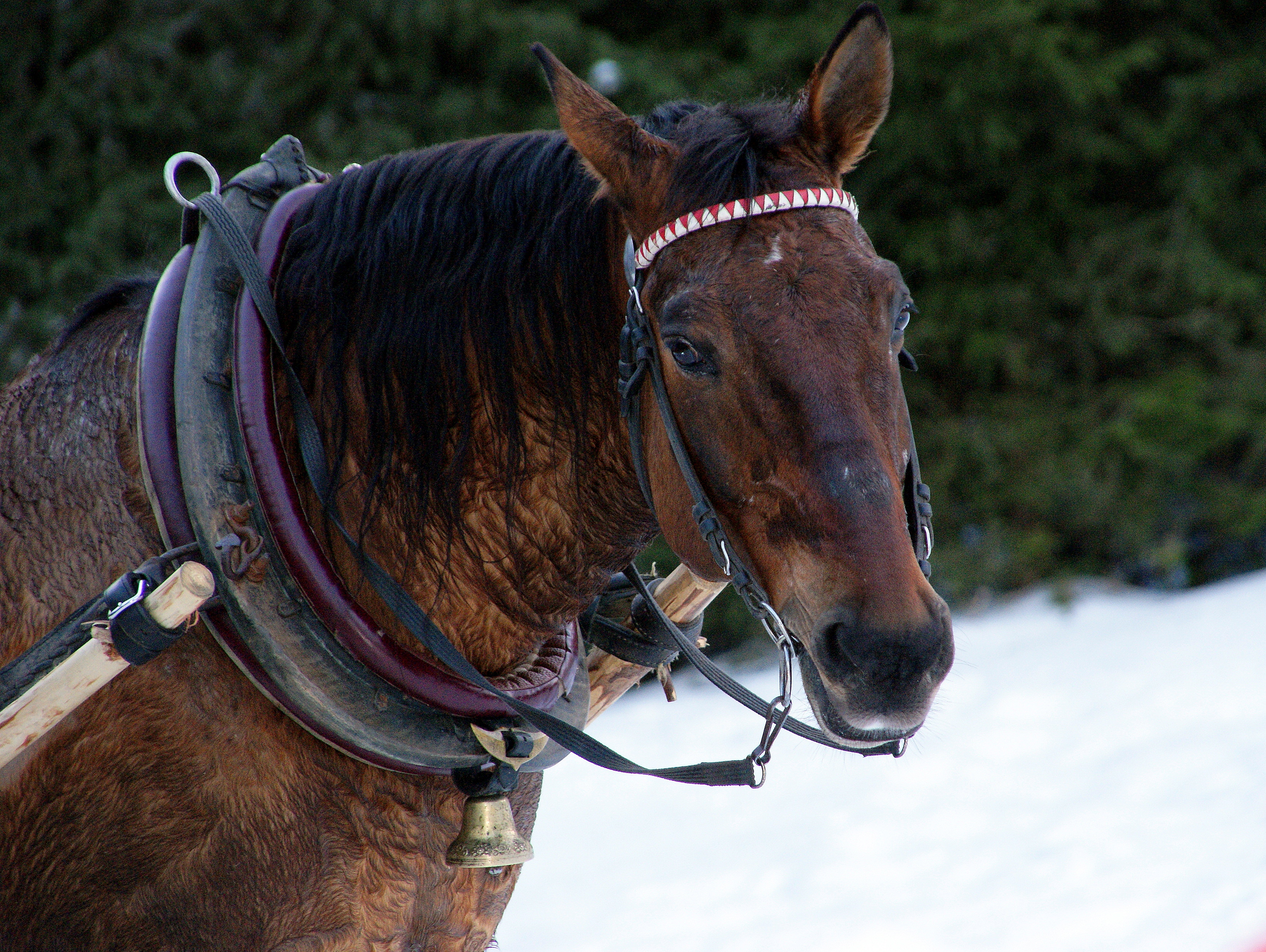 Koń z chomątem zaopatrzonym w dzwonek; polskie Tatry Zachodnie, luty 2010